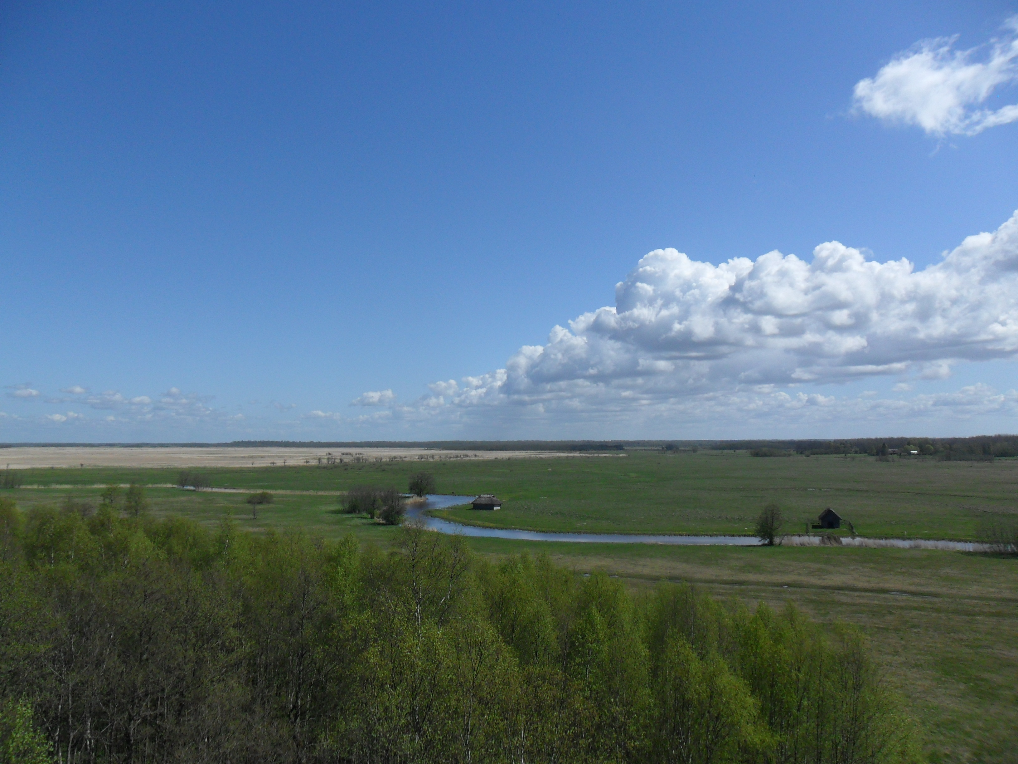 Matsalu rahvuspark